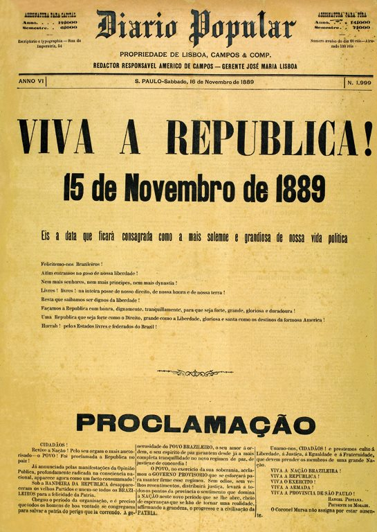 Capa do Diário Popular. Fundo documental: Correio da Manhã.